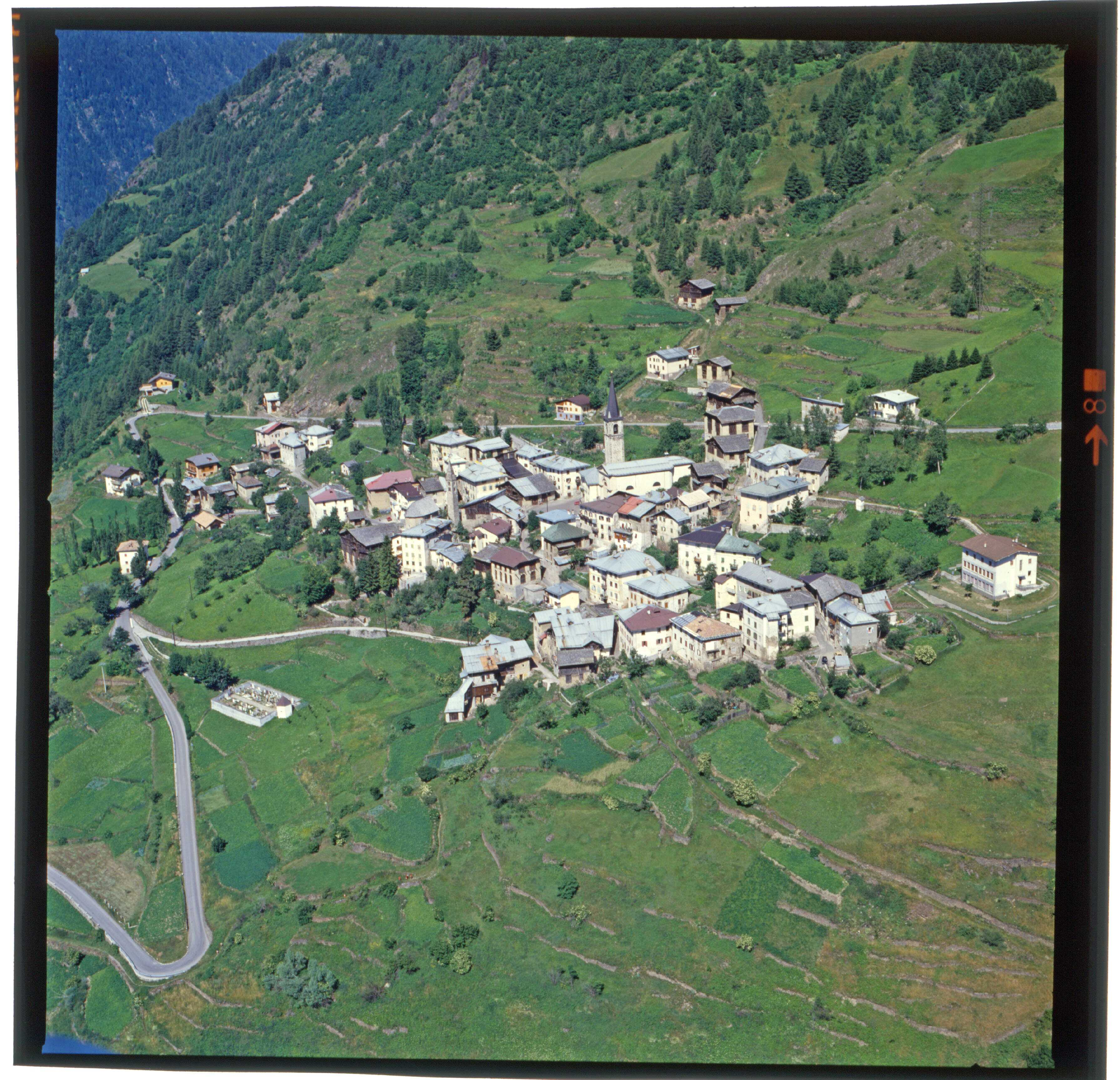 Foto aerea di Termenago, anni 1970